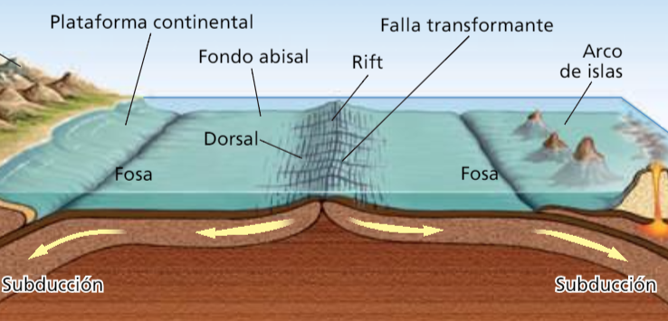 Partes de las principales unidades del relieve terrestre